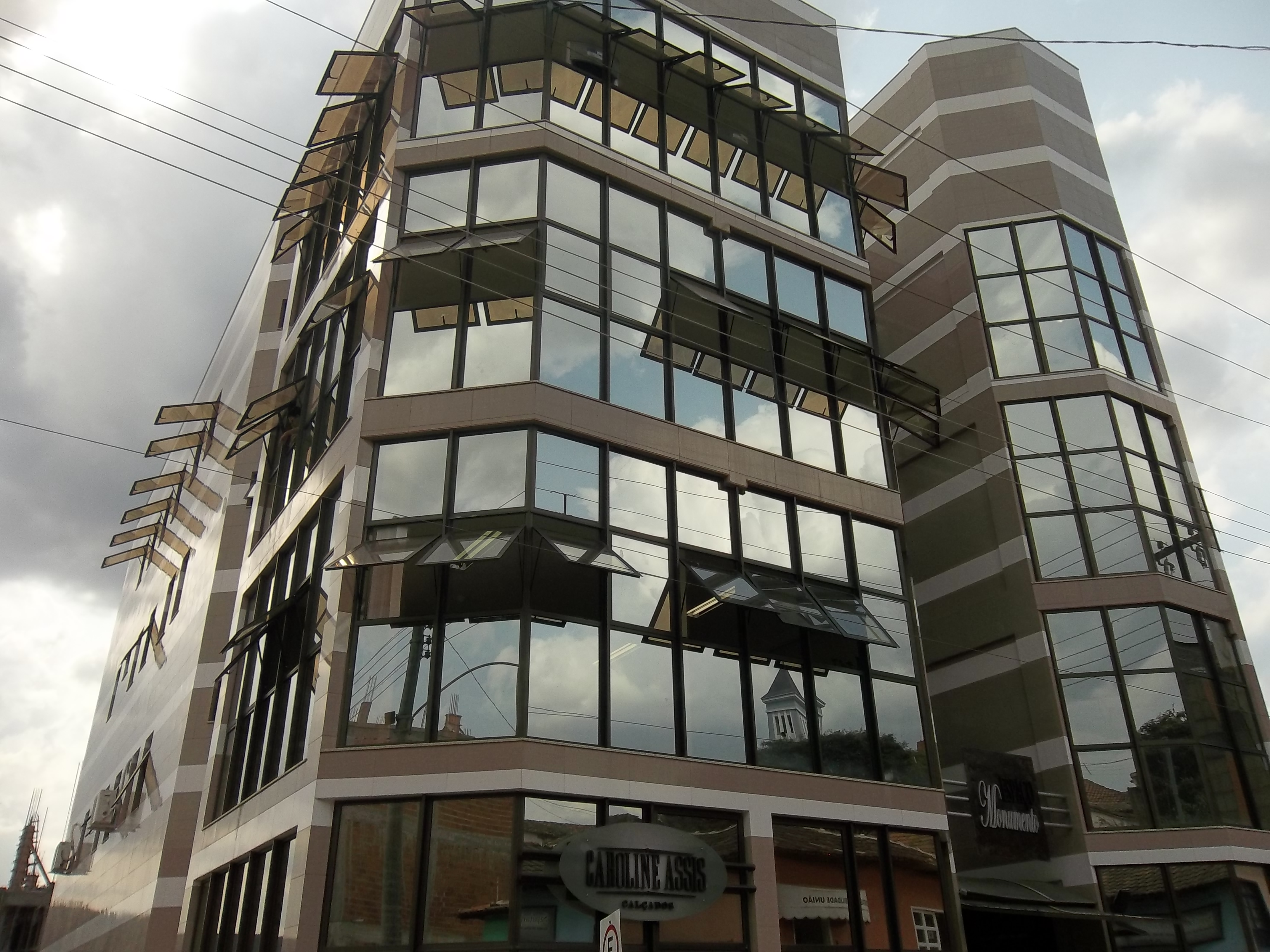 Prédio na Região Central de Capelinha: Isso mostra o constante desenvolvimento que a cidade vem tendo.